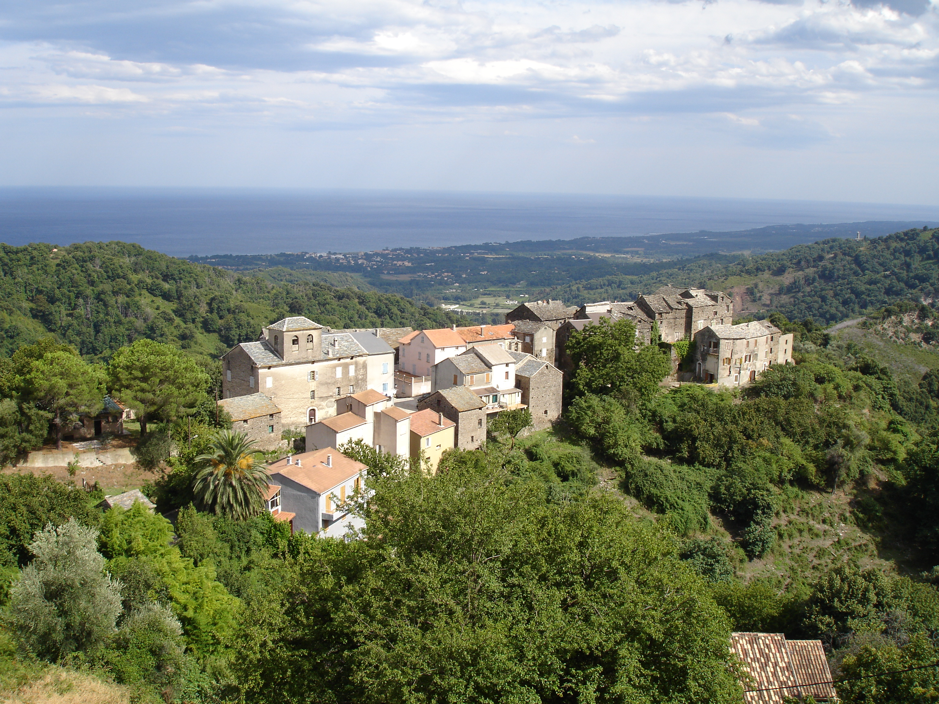 Hameau_Orneto.JPG